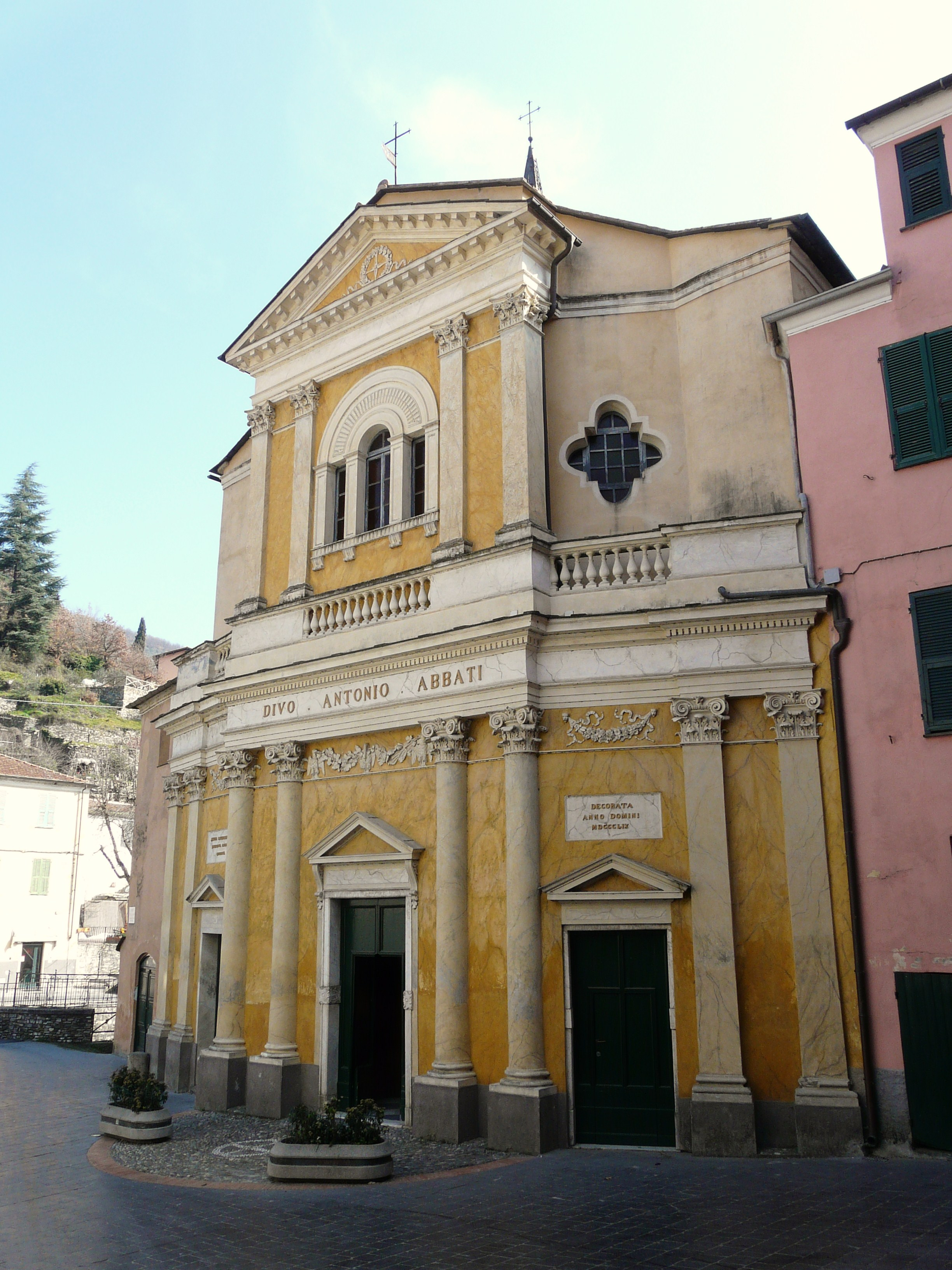 Chiesa di Sant'Antonio, Borgomaro, Liguria, Italia